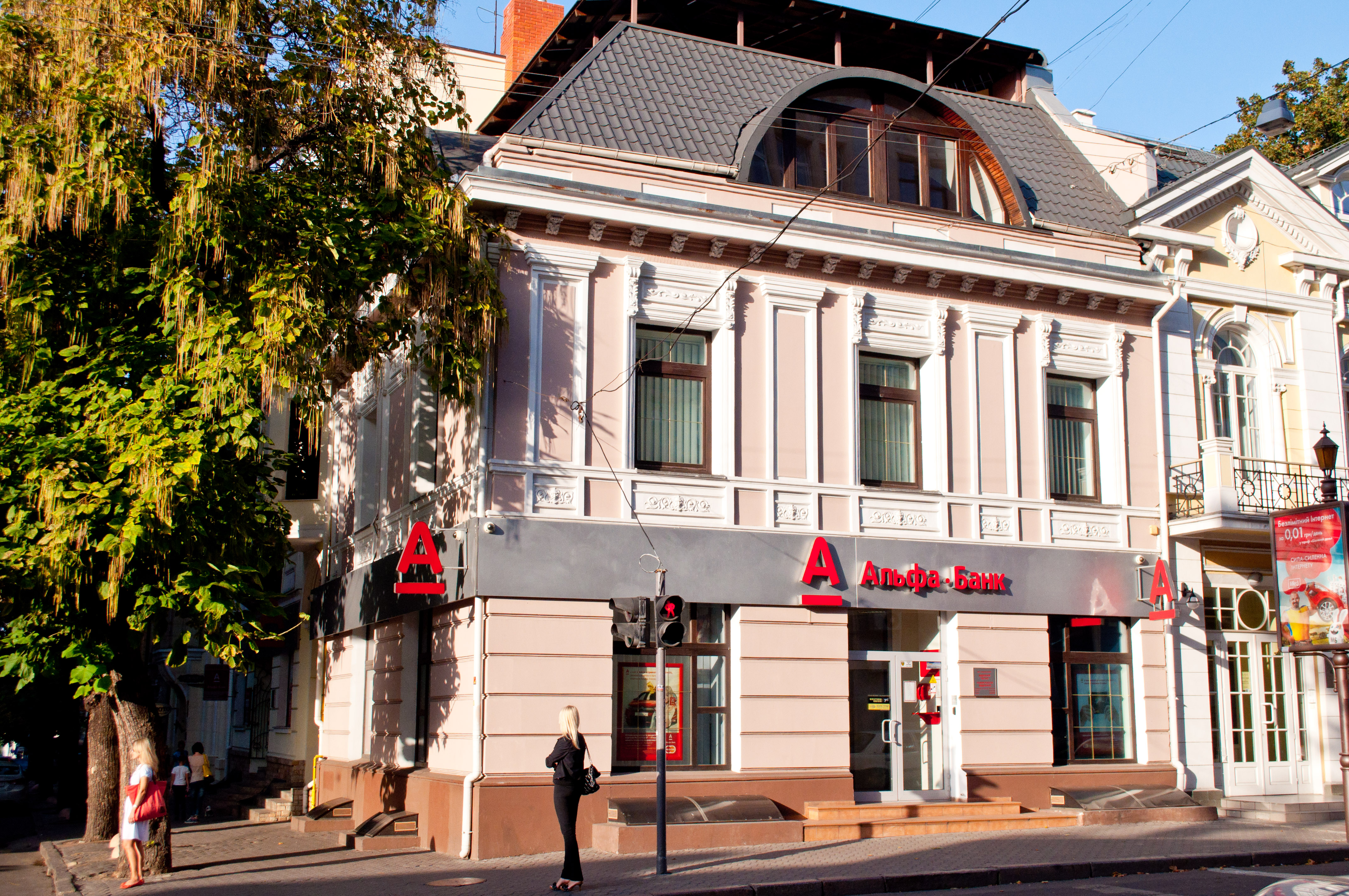 Комплекс торгівельних будинків Страца. Будинок торгівельний